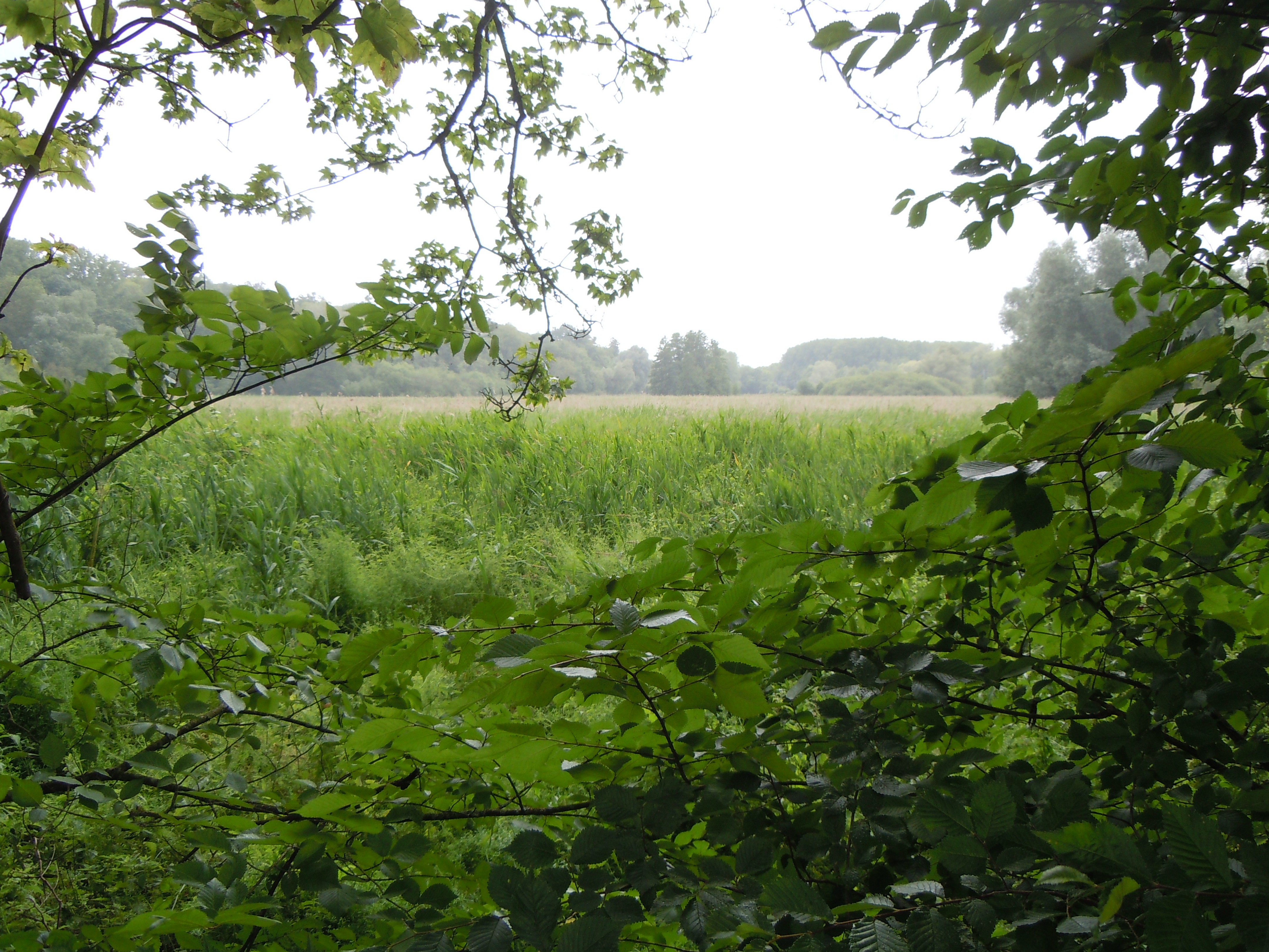 Marais d'Ableiges - Montgeroult- Val d'Oise - France